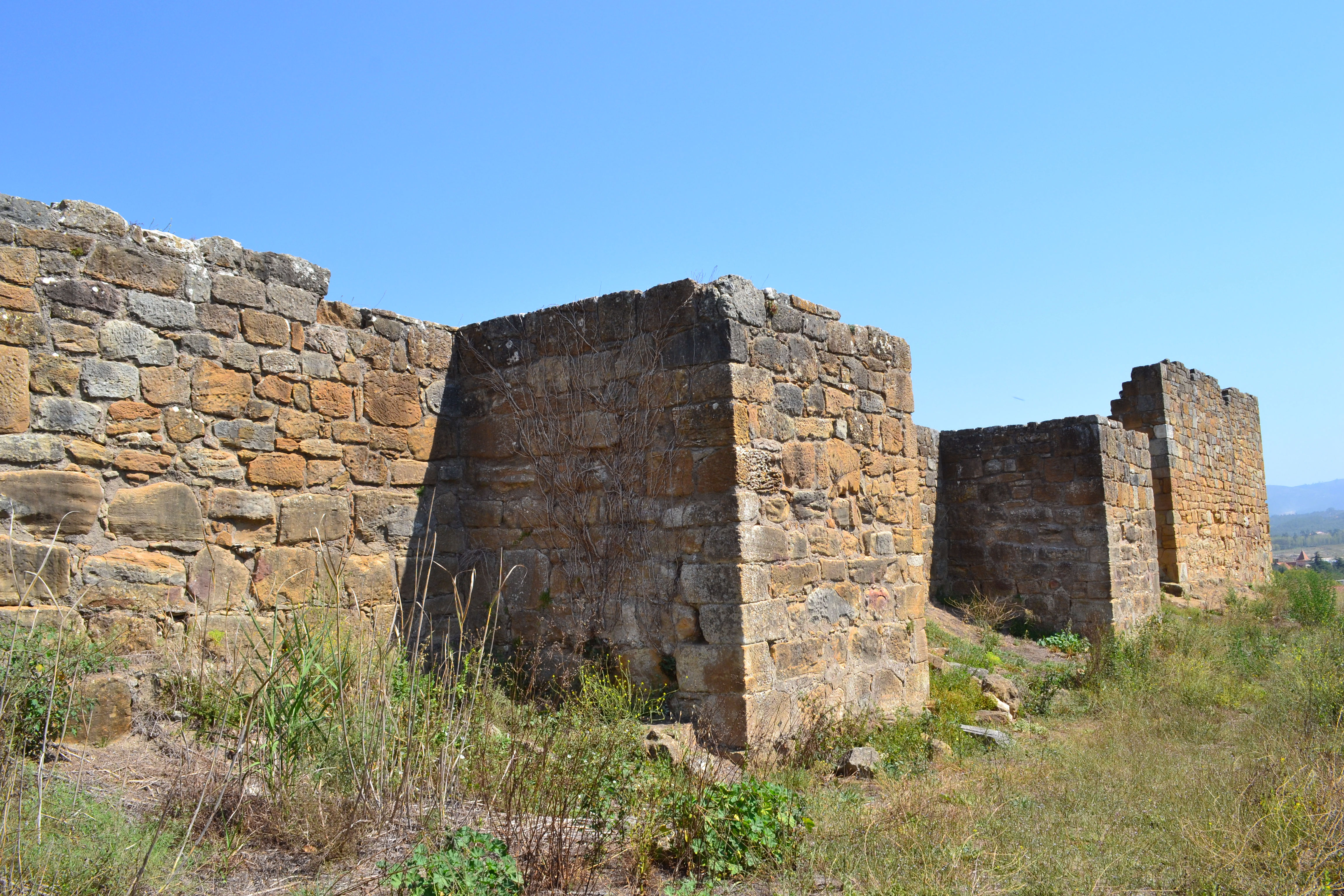 Ruínas Castelo Alcobaça This file was uploaded for Wiki Loves Monuments in Portugal with the unique identifier 73654.